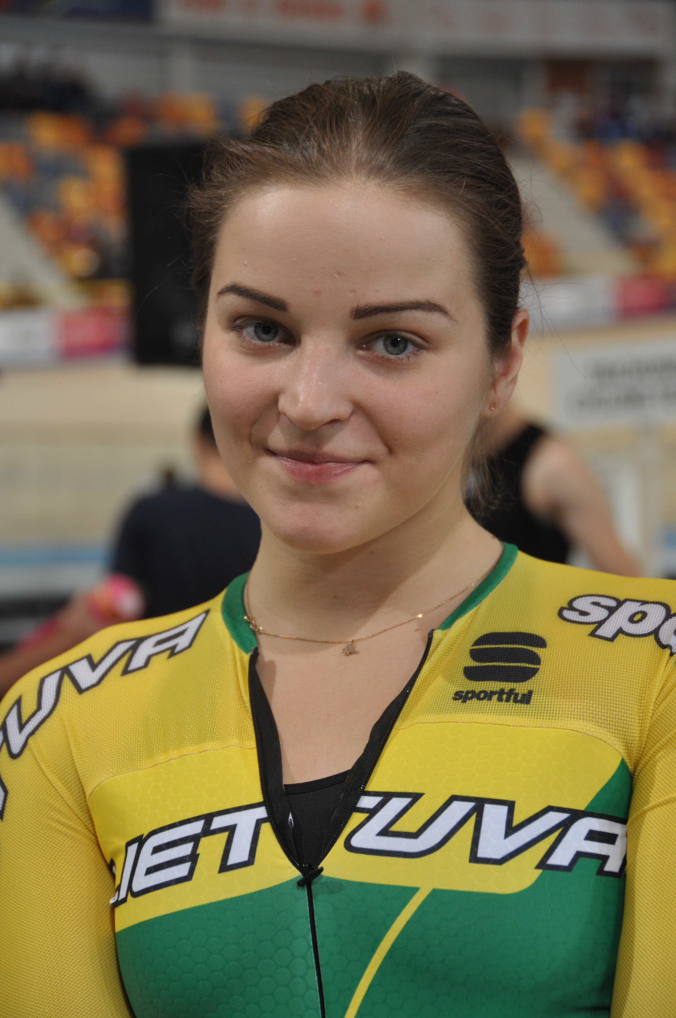 Migle Marozaite, litauische Radsportlerin